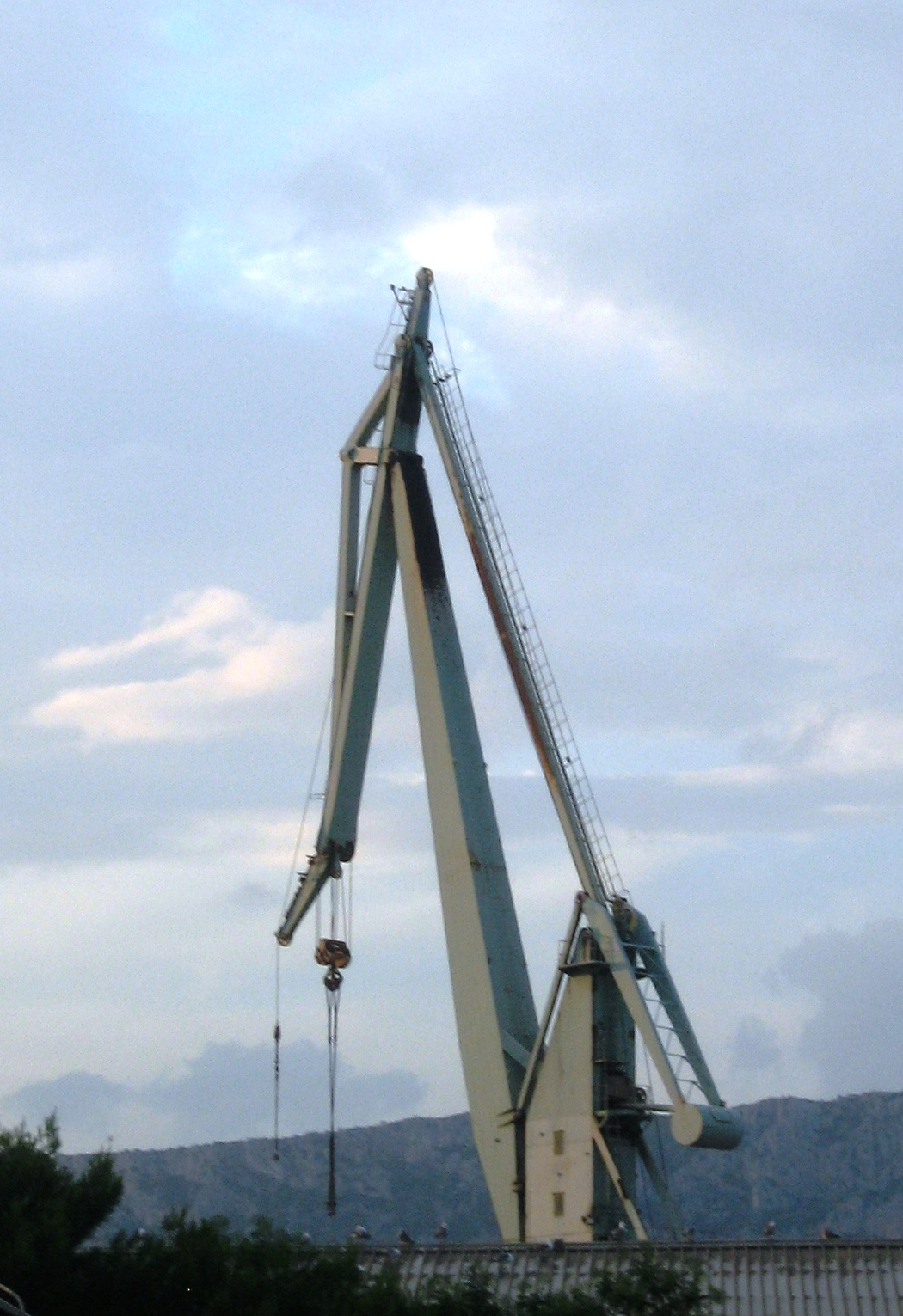 Dizalica u splitskom škveru